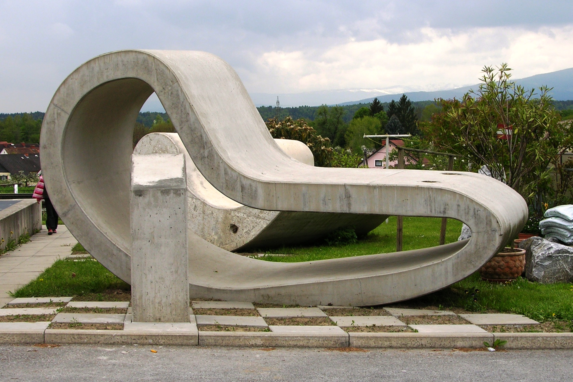 Wakolbinger (2003) in Lieboch (2008)